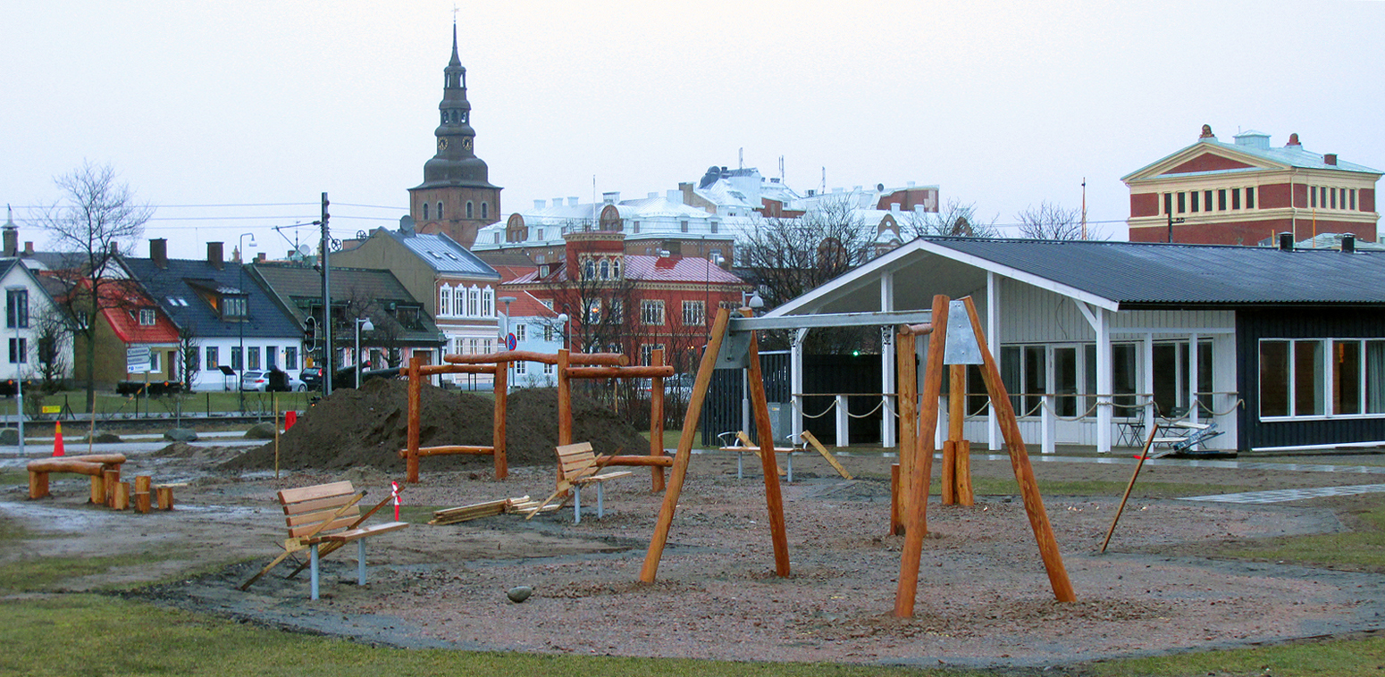 En ny lekplats under byggnation i Ystads småbåtshamn 4 mars 2016.